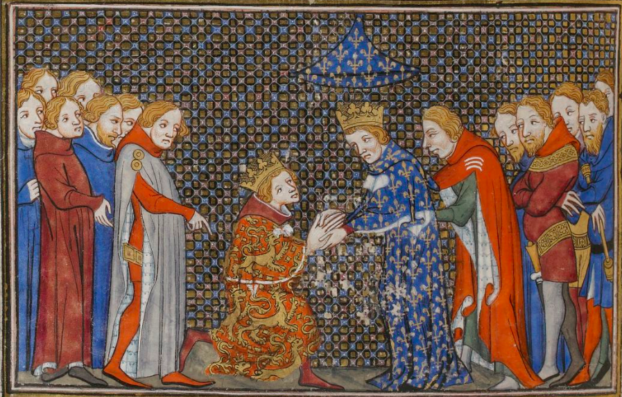 Hommage du roi Édouard III d'Angleterre au roi Philippe VI de France en 1329.